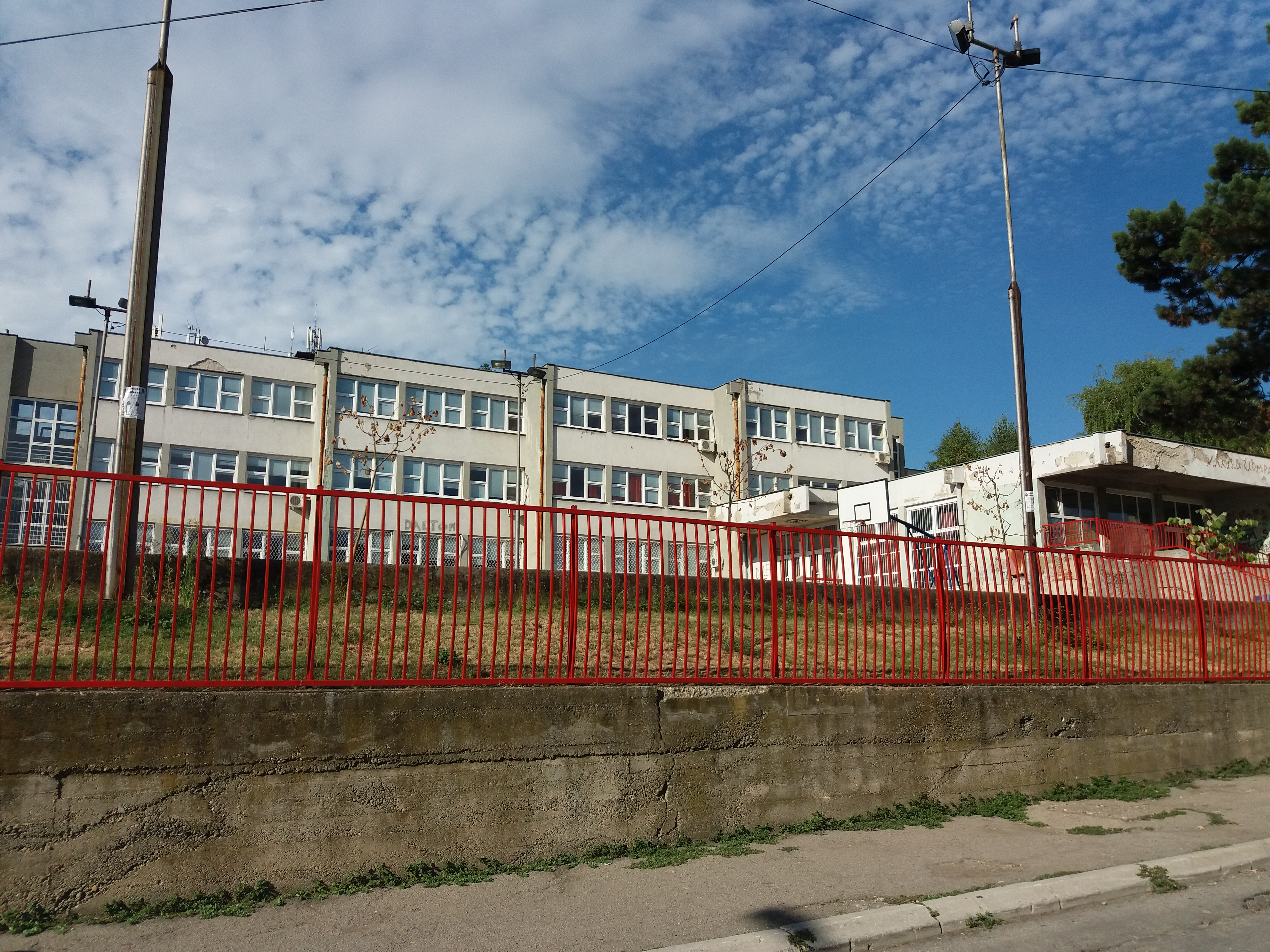 Srpski (latinica): Osnovna škola Olga Milošević, Smederevska Palanka